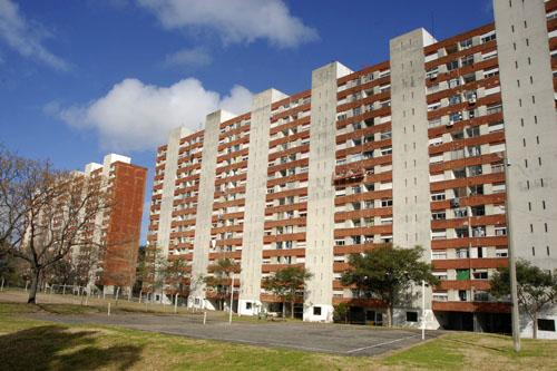 Vista desde dentro del Complejo Parque Posadas.